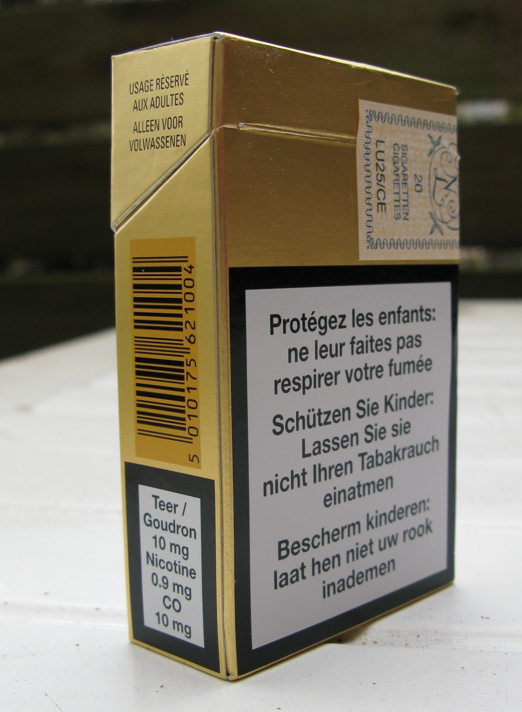 Gedréckten Etiketten